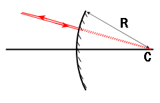 Centre d'un miroir convexe.